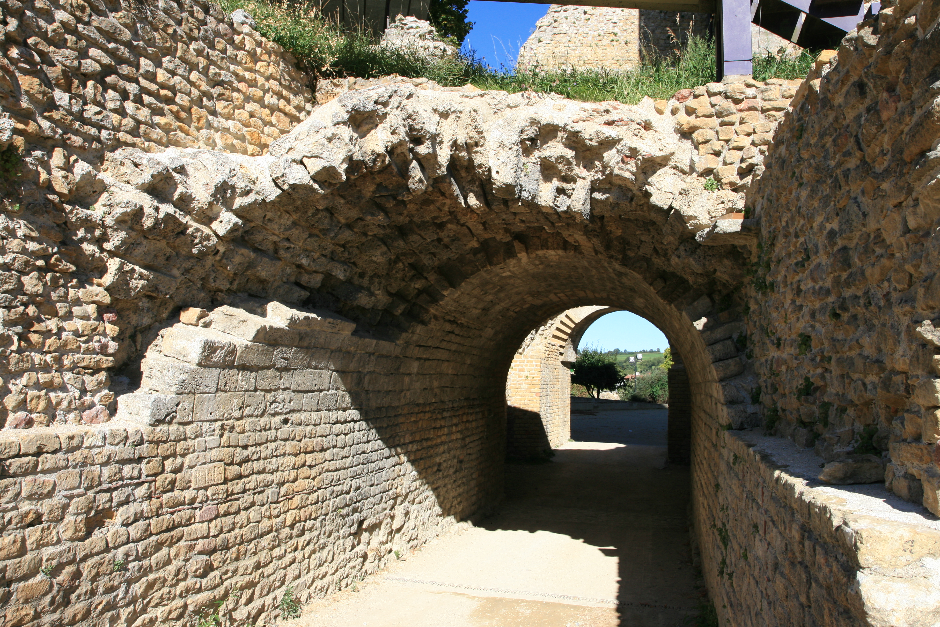 Tour de l'évèque et amphithéatre d'Avenches